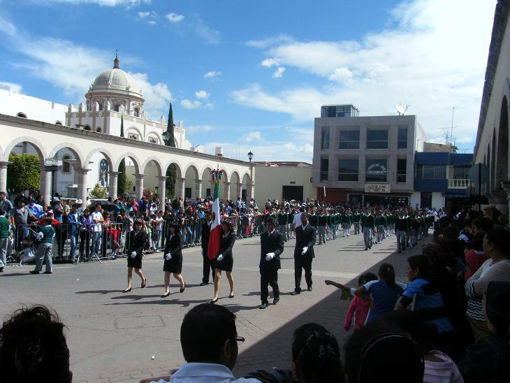 Desfile en Uriangato